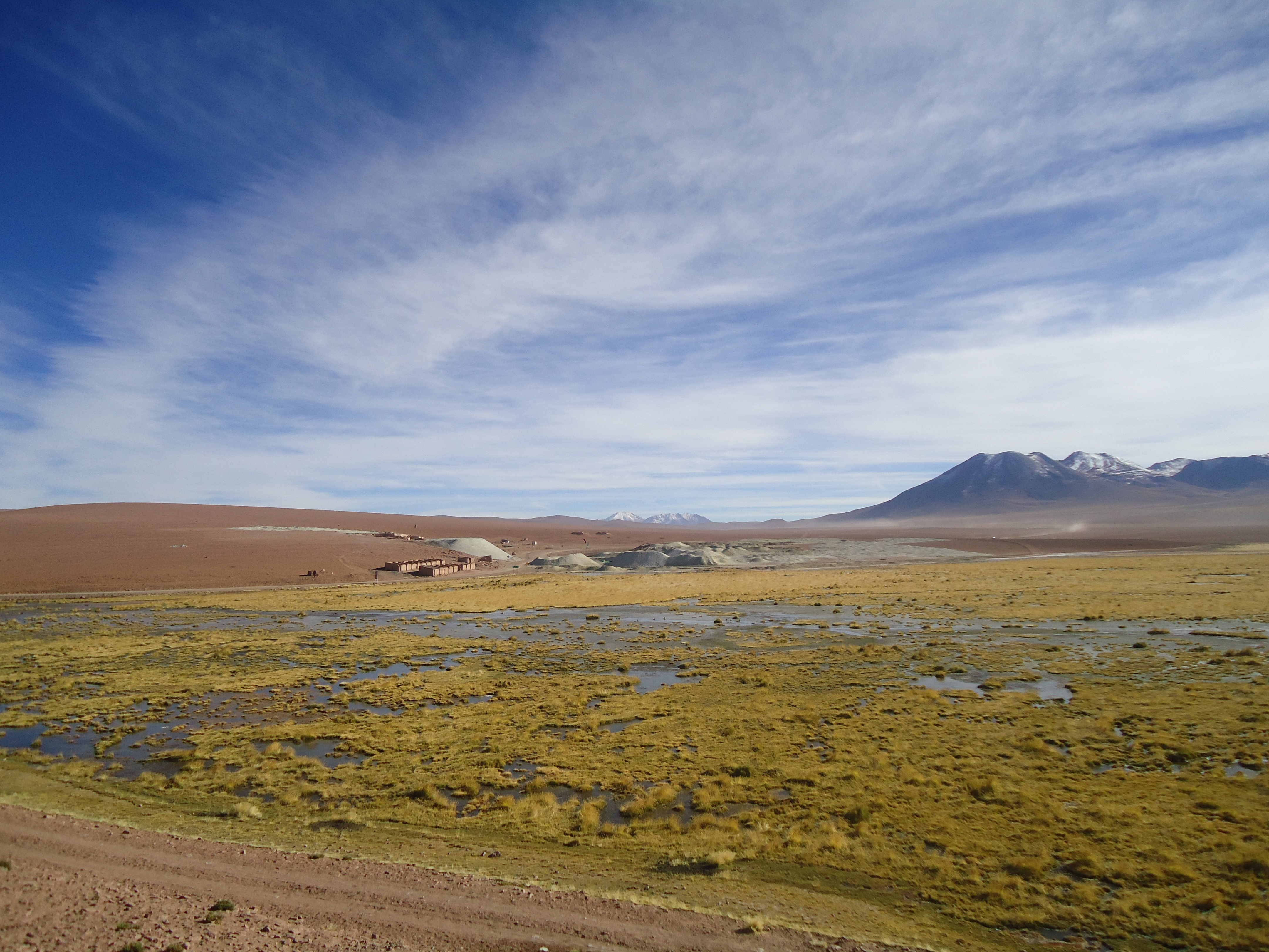 Vista Río Putana